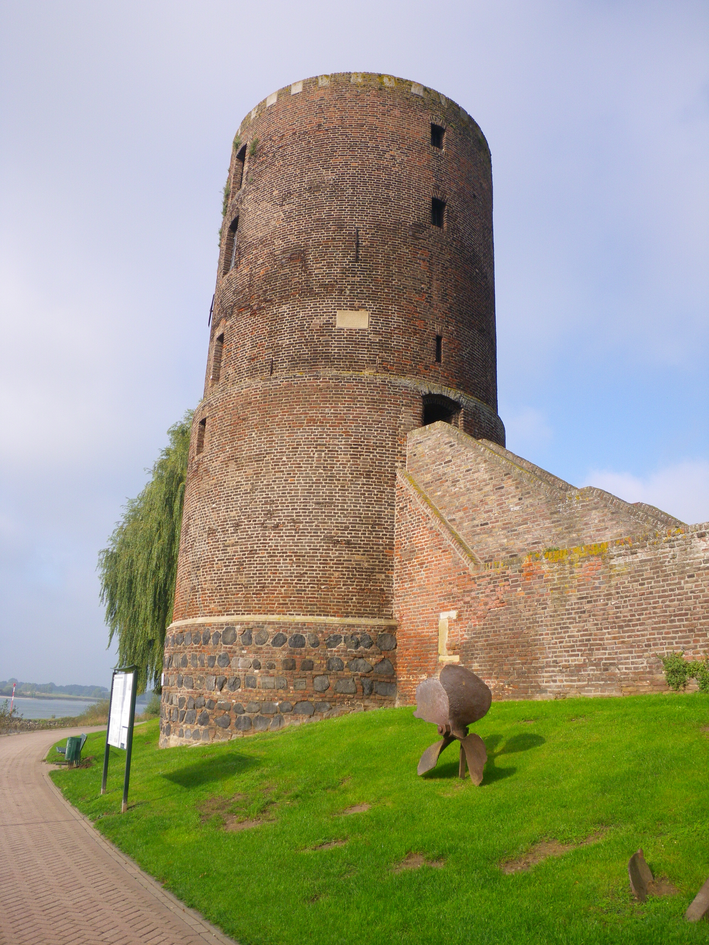 Denkmalgeschützter Wehrturm (öffentl. begehbar) Erstellung:1470 Ortslage: Rees, Am Mühlenturm Web-Link